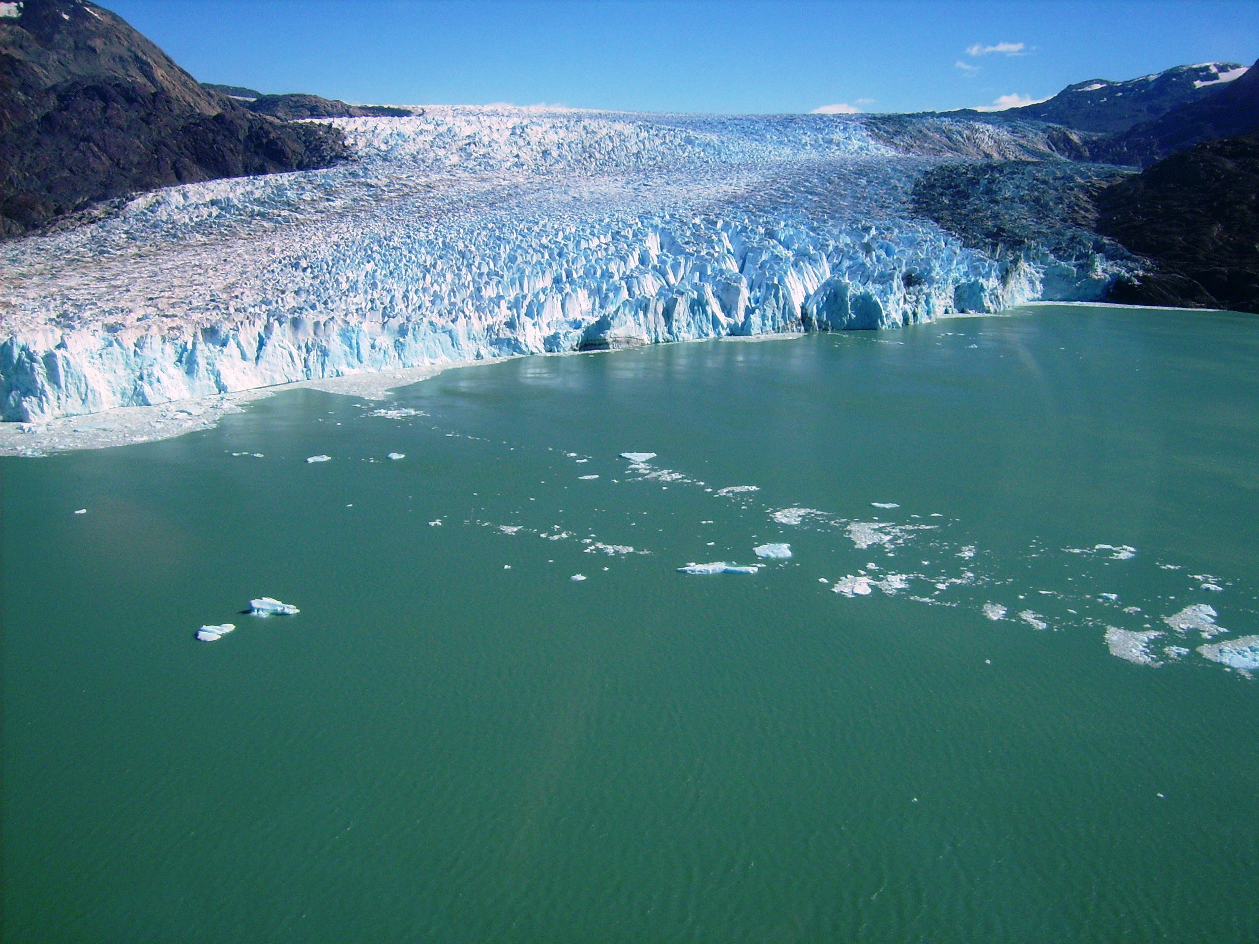 Glaciar de 3,5 km de ancho bajando hacia el lago O'Higgins